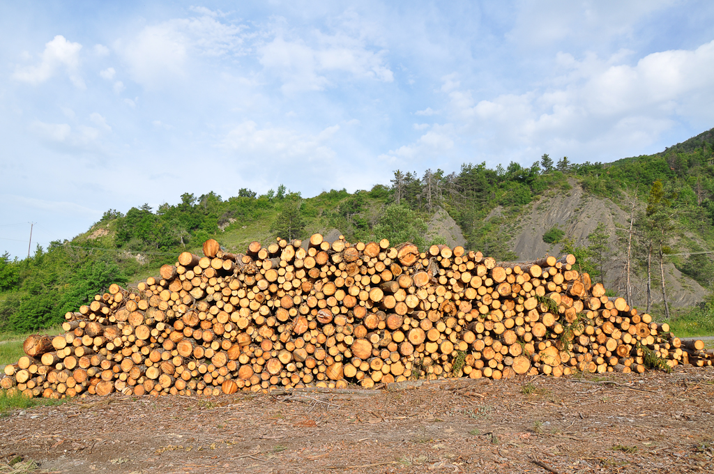 Bayons, bouscatière